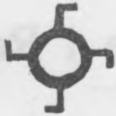 Гербовый знак Половцов Рожиновских от Дзедулевича